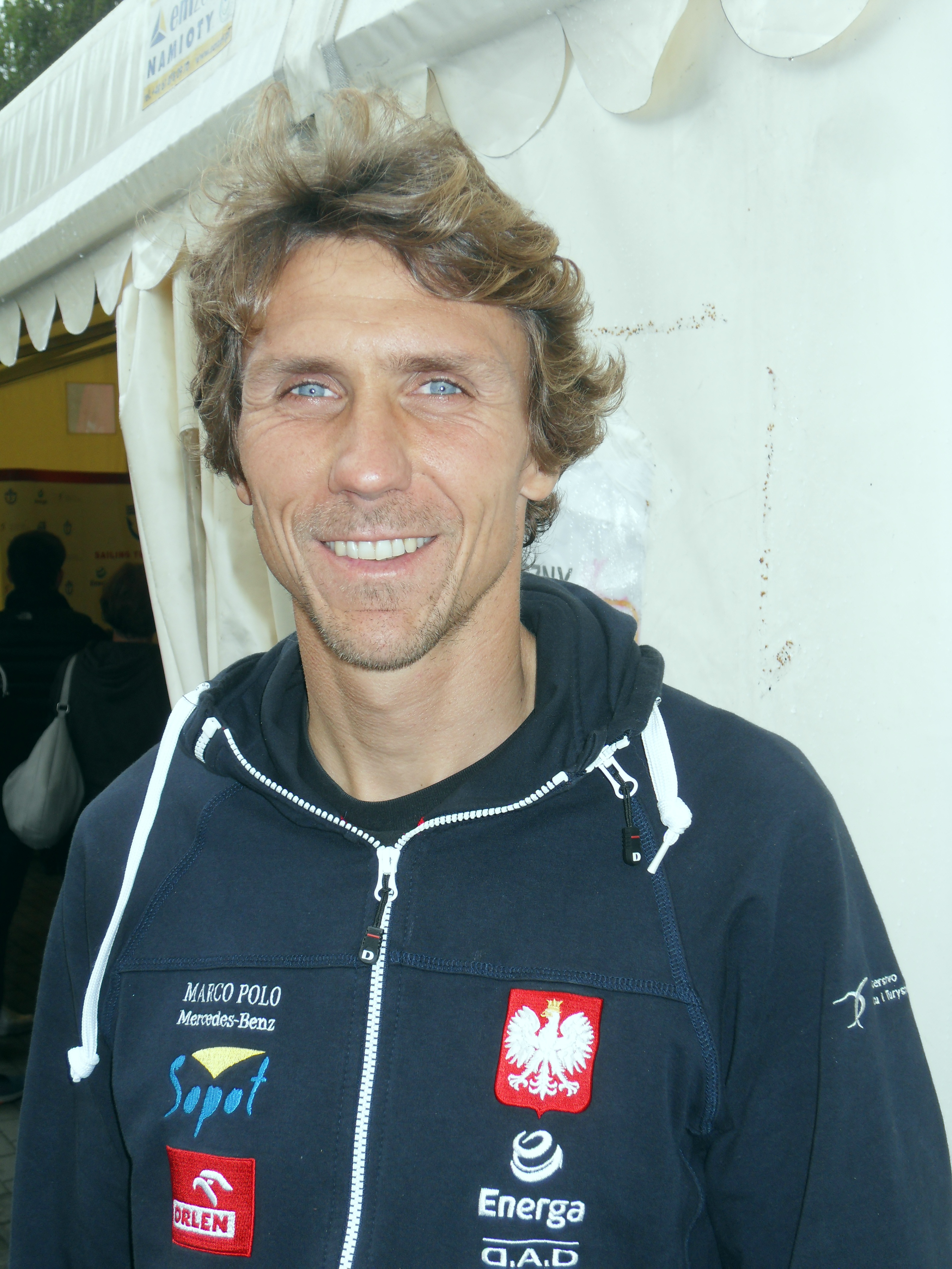 Przemysław Miarczyński, gdański żeglarz (reprezentant Polski w windsurfingu).